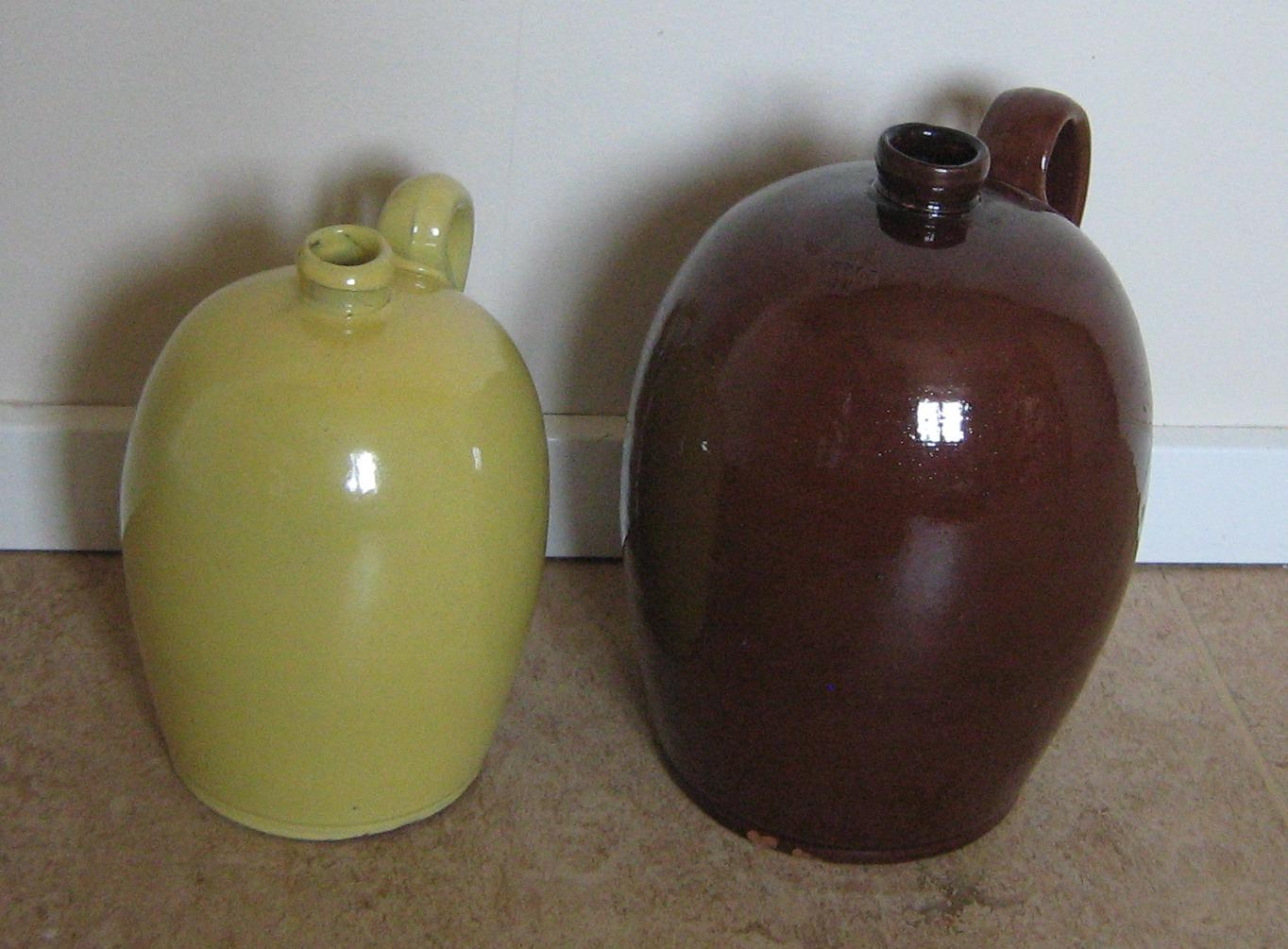 Två lergodskrus, Bobergs kakelfabrik, 1/2 och 1 kannas rymd.